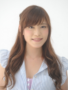 日本のシンガーソングライター